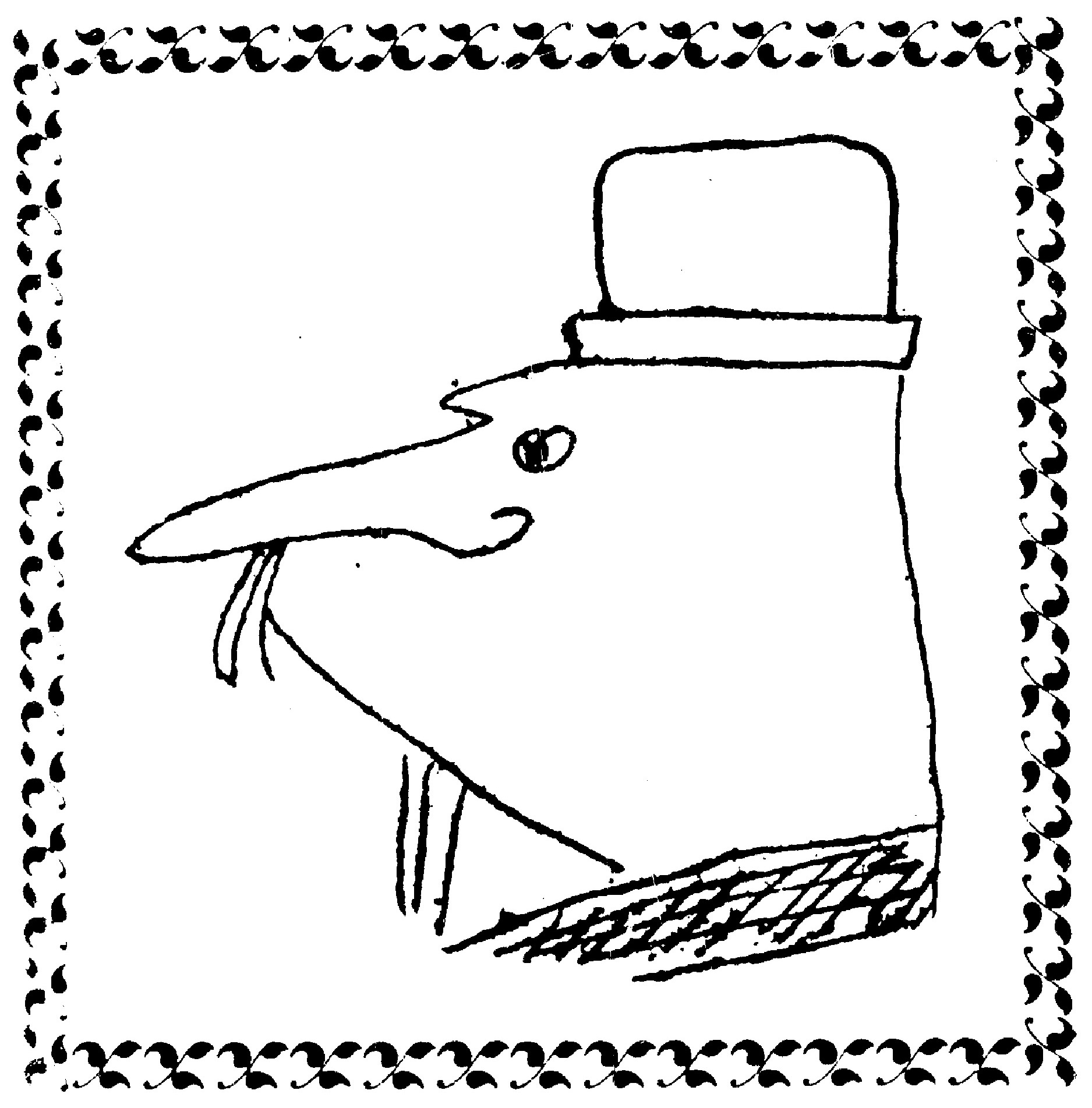 Ubu Roi, Mercure de France.